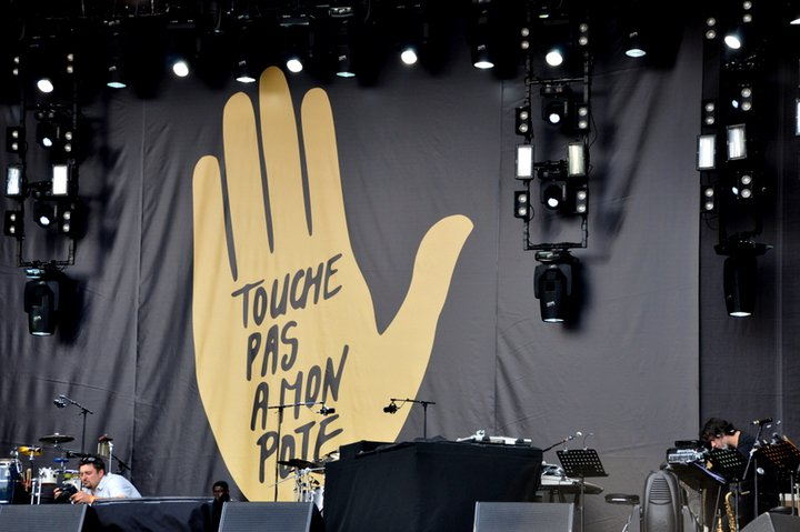 Concert pour l'égalité de SOS-Racisme